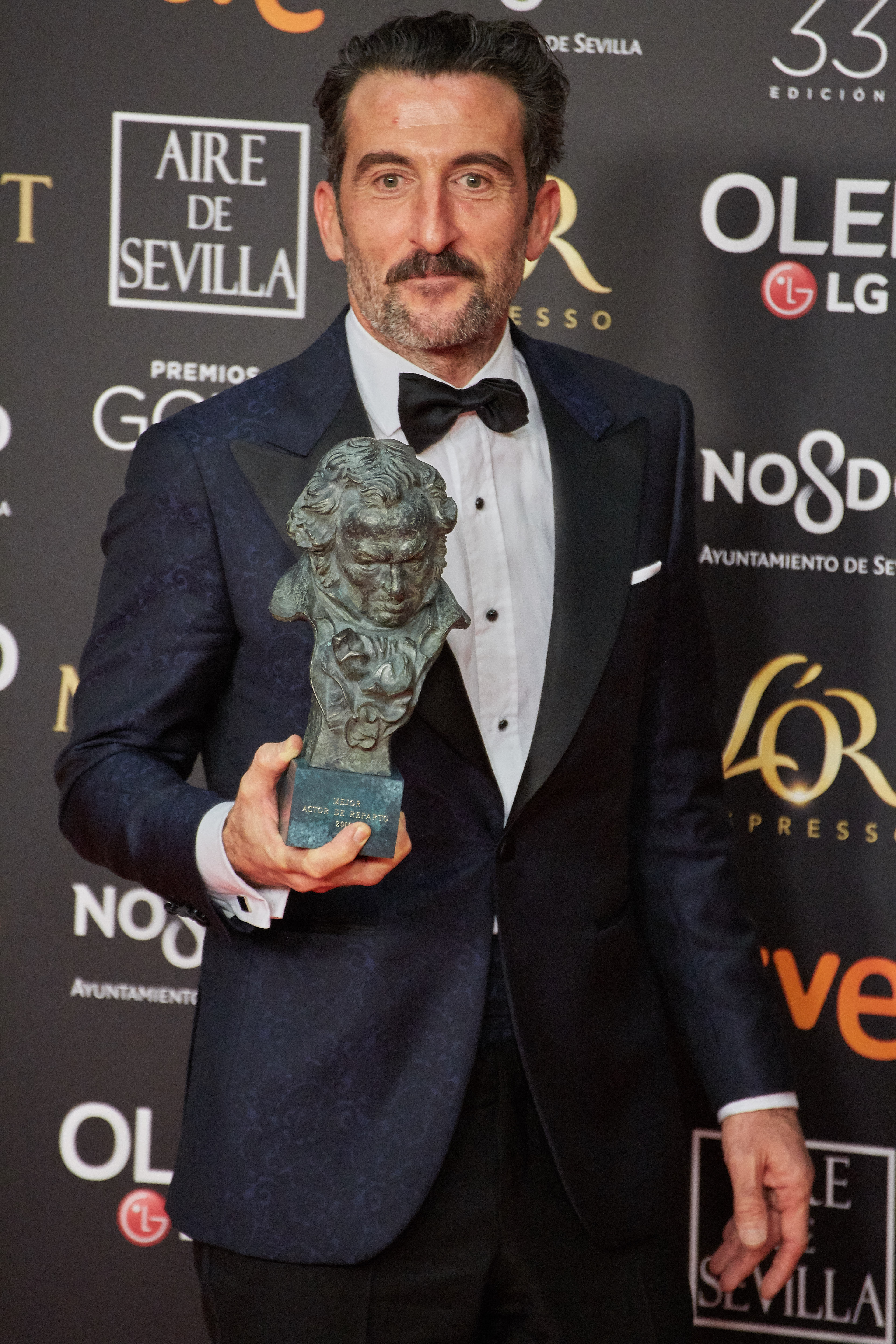 Luis Zahera exhibiendo su Goya a la Mejor Interpretación Masculina de Reparto por El Reino